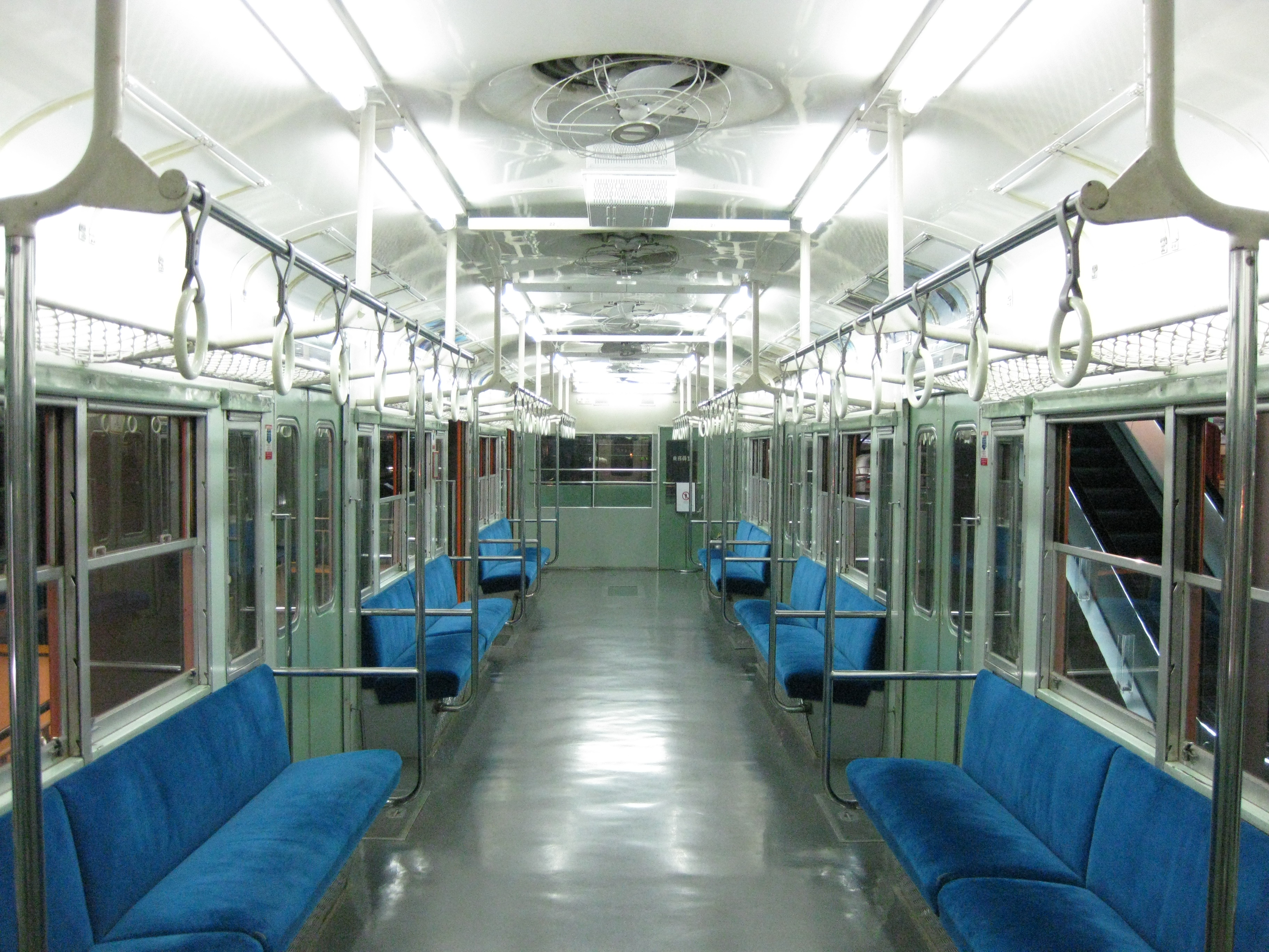 鉄道博物館に展示中のクモハ101-902内部